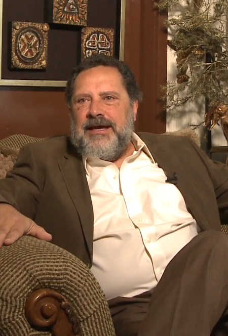 Javier Díaz Dueñas, un hombre satisfecho arriba y debajo de los escenarios